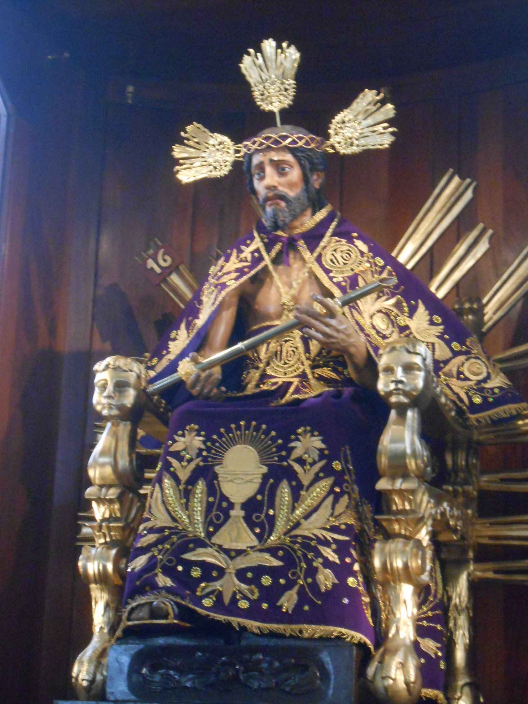 Señor del Mar, Patron del Callao